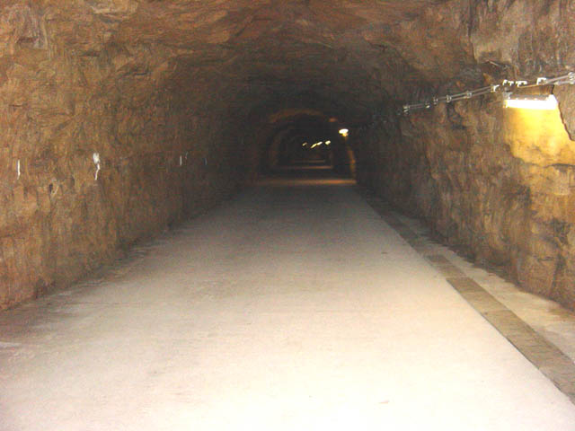 Den Tunnel ënner der Stad, dee vun 1961-1963 an de Fiels gesprengt gouf, fir e Kanalsrouer vum Péitrussdall an de Pafendall ze verleeën a fir als Loftschutzbunker ze dingen.